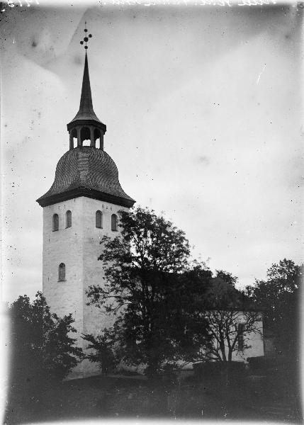 Kyrkan mot sydväst. Kategori: (01) ExteriörerKyrkan mot sydväst.